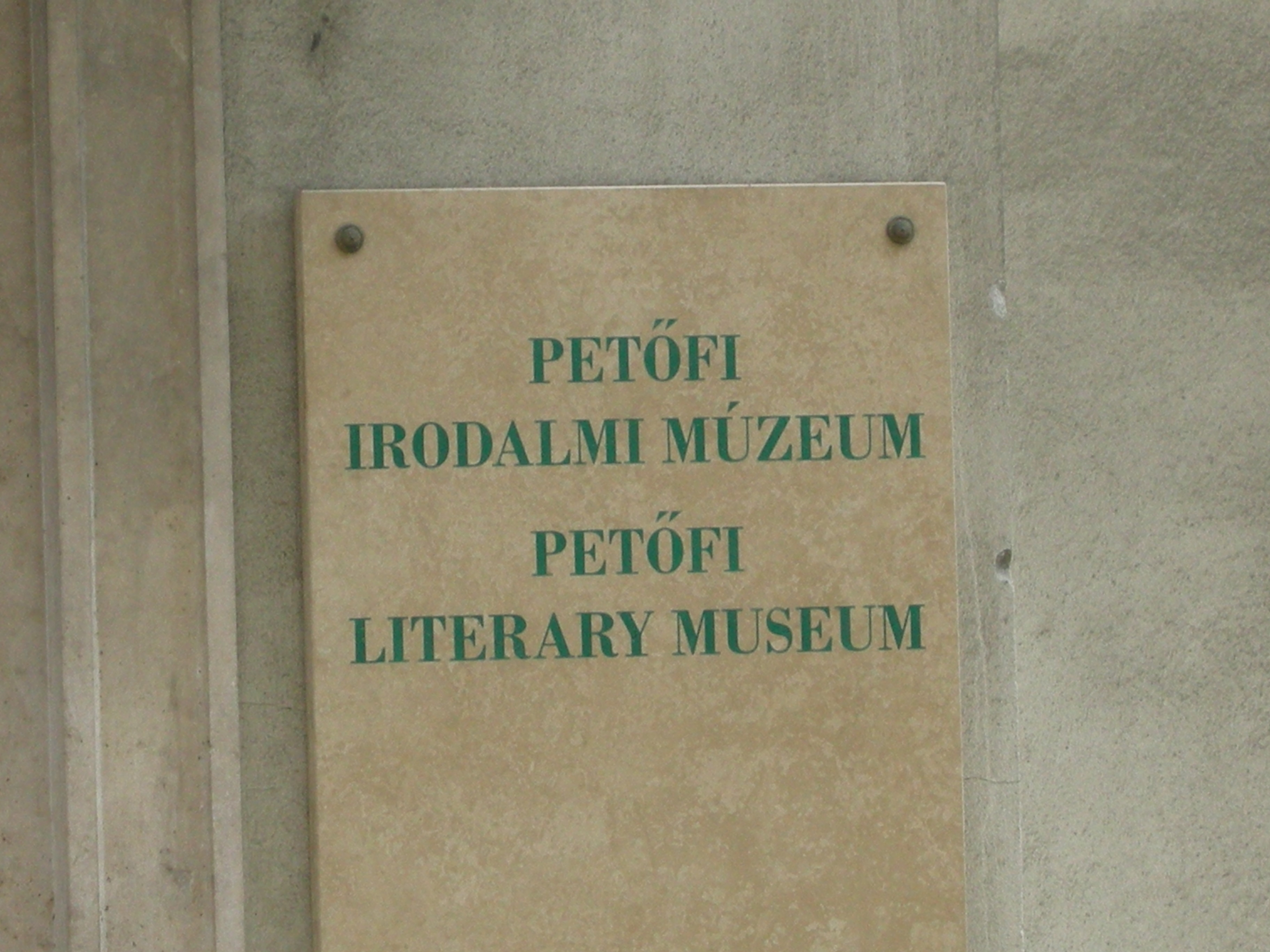 Budapest